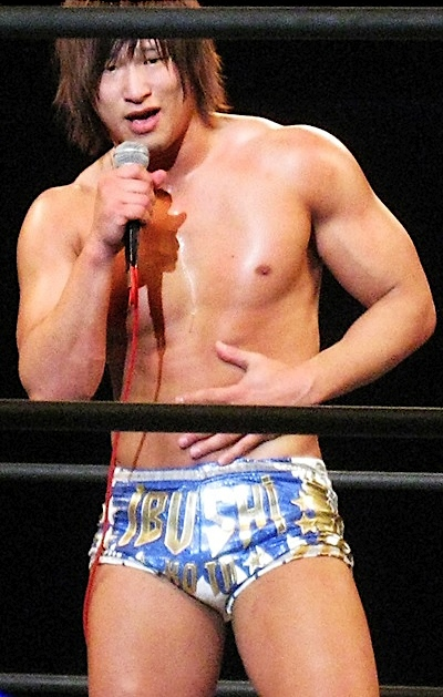 2015年3月22日 ベイコム総合体育館「Road to INVASION ATTACK 2015」飯伏幸太